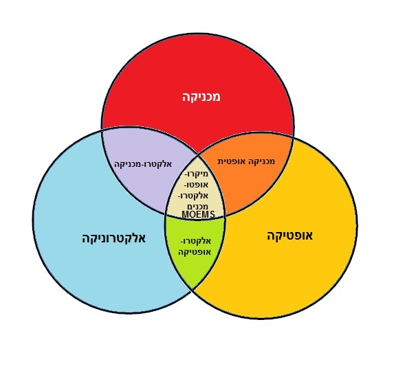 שילוב עולמות תוכן בתחום הננוטכנולוגיה להמחשת המושג MOEMS מערכות מיקרו-אופטי-אלקטרו-מכניות.